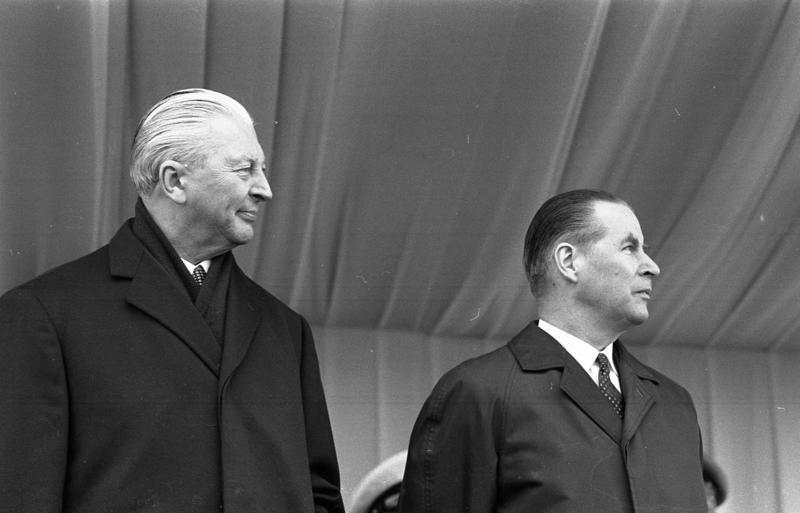 20 Jahre NATO. Bundeswehrparade auf dem Nürburgring.